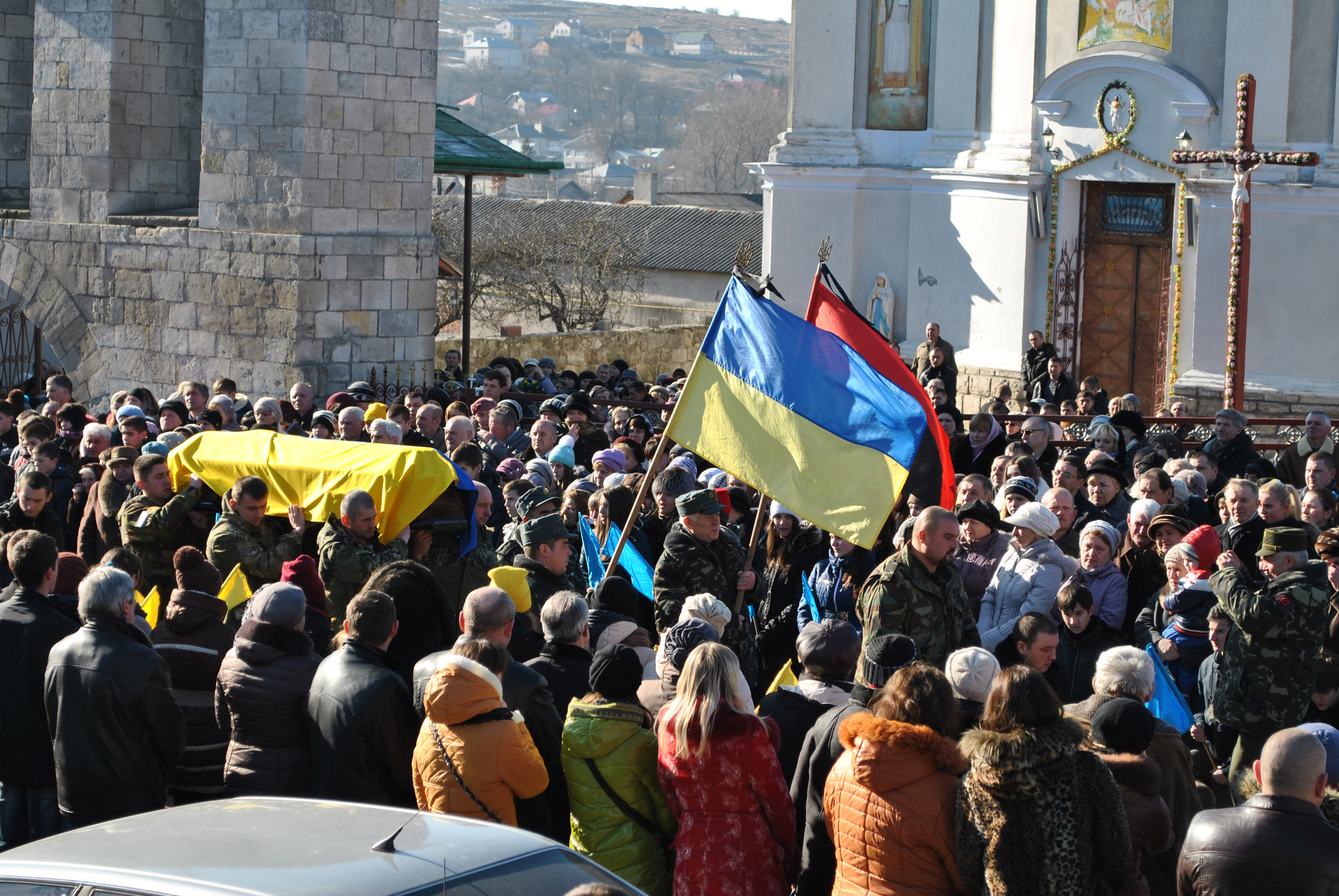 Похорон українського військовика, оператора-навідника БМП 24-ї окремої механізованої бригади (Яворів), уродженця м. Збараж Тернопільської області Тараса Михальського. Похоронна процесія біля Свято-Успенської церкви.